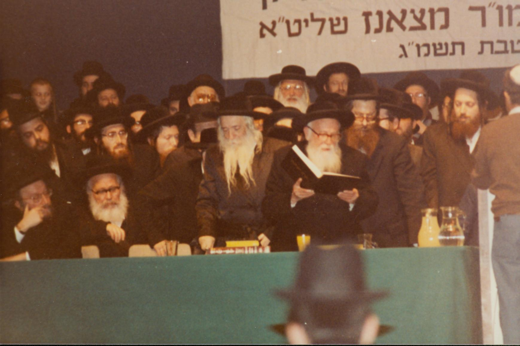 הג"ר שלמה זלמן אויערבך מסיים את השס במחזור הראשון של כולל שס. לאחר הסיום הייתה ההכרזה על ייסוד מפעל השס, טבת ה'תשמ"ג